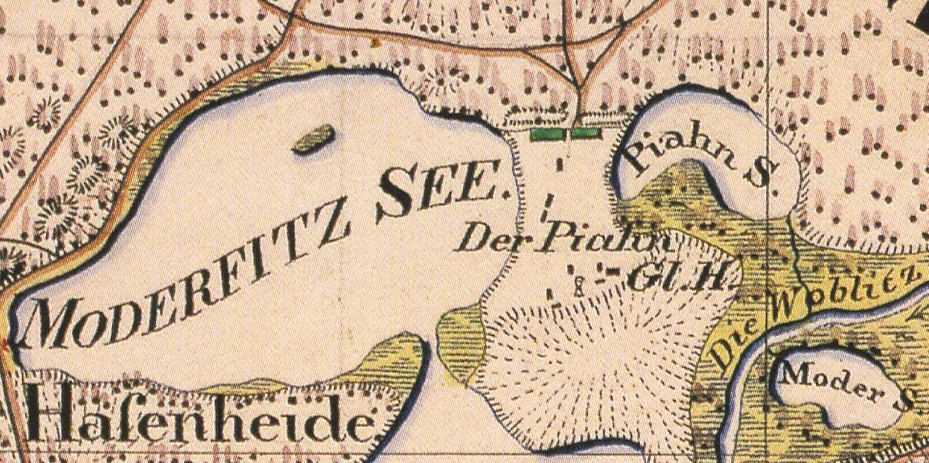 Moderfitzsee, Piansee und Pian, OT Himmelpfort, Fürstenberg/Havel, Lkr. Oberhavel, Brandenburg, Preußische Landesaufnahme, Urmesstischblatt 2845 Bredereiche von 1825